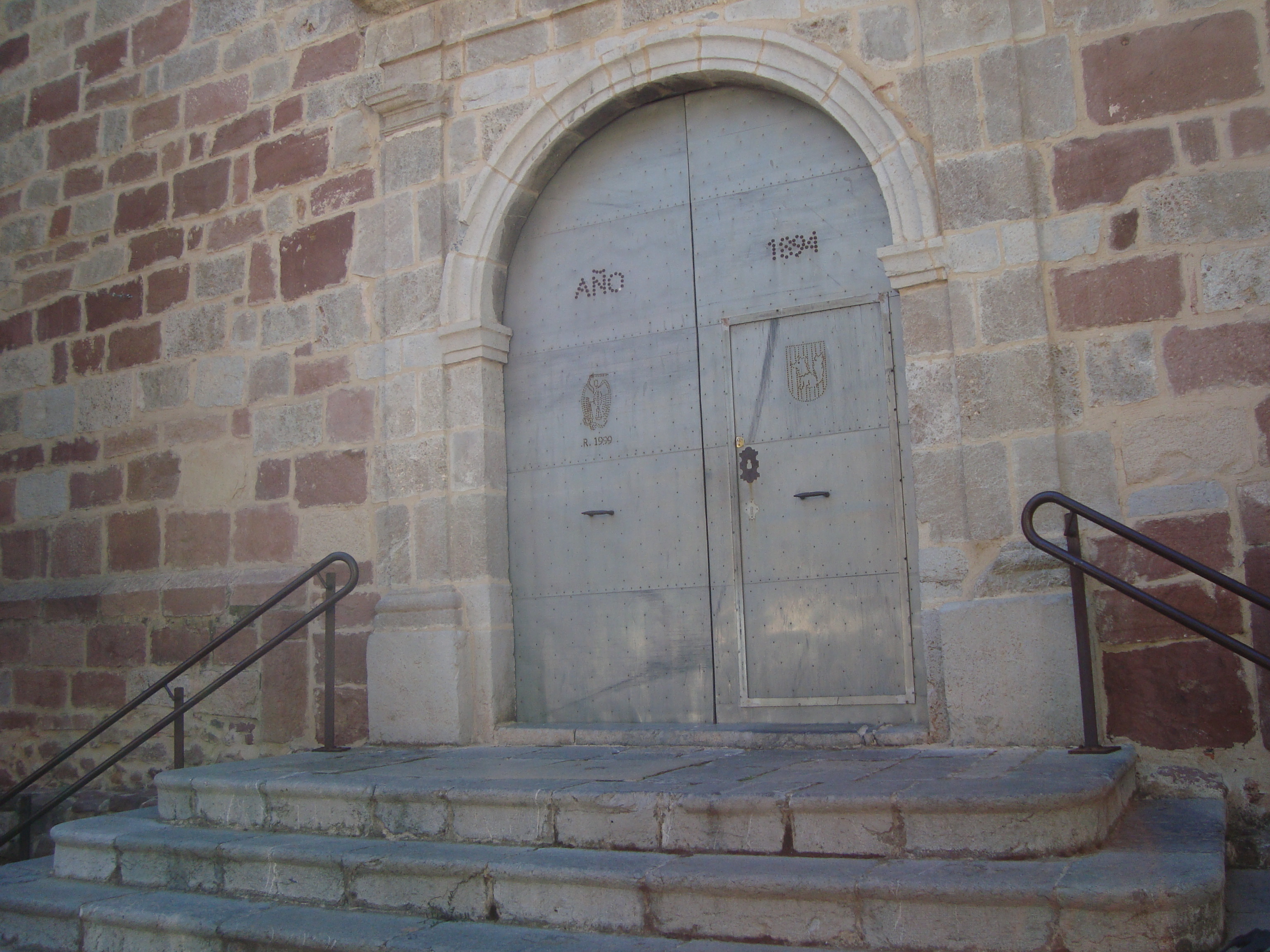 Església parroquial de Sant Miquel Arcàngel (la Pobla Tornesa) 05.094-001.